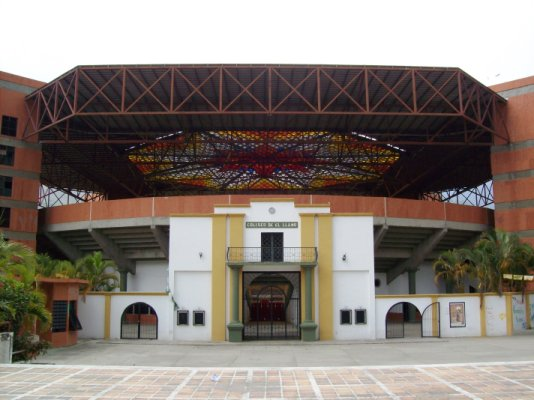 Vista frontal de la Plaza de Toros de Tovar